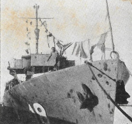 פגיעות בחרטום אח"י וג'ווד שנגרמו בקרב על ידי תותחי חוף ומטוסים מצריים